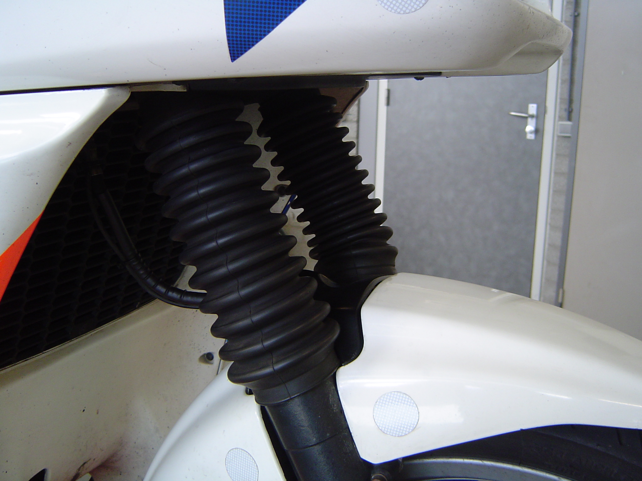 Forcella munita di copristeli.